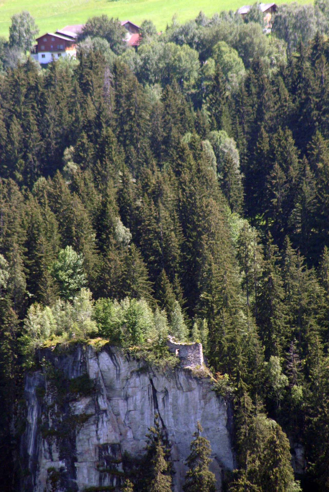 Lage